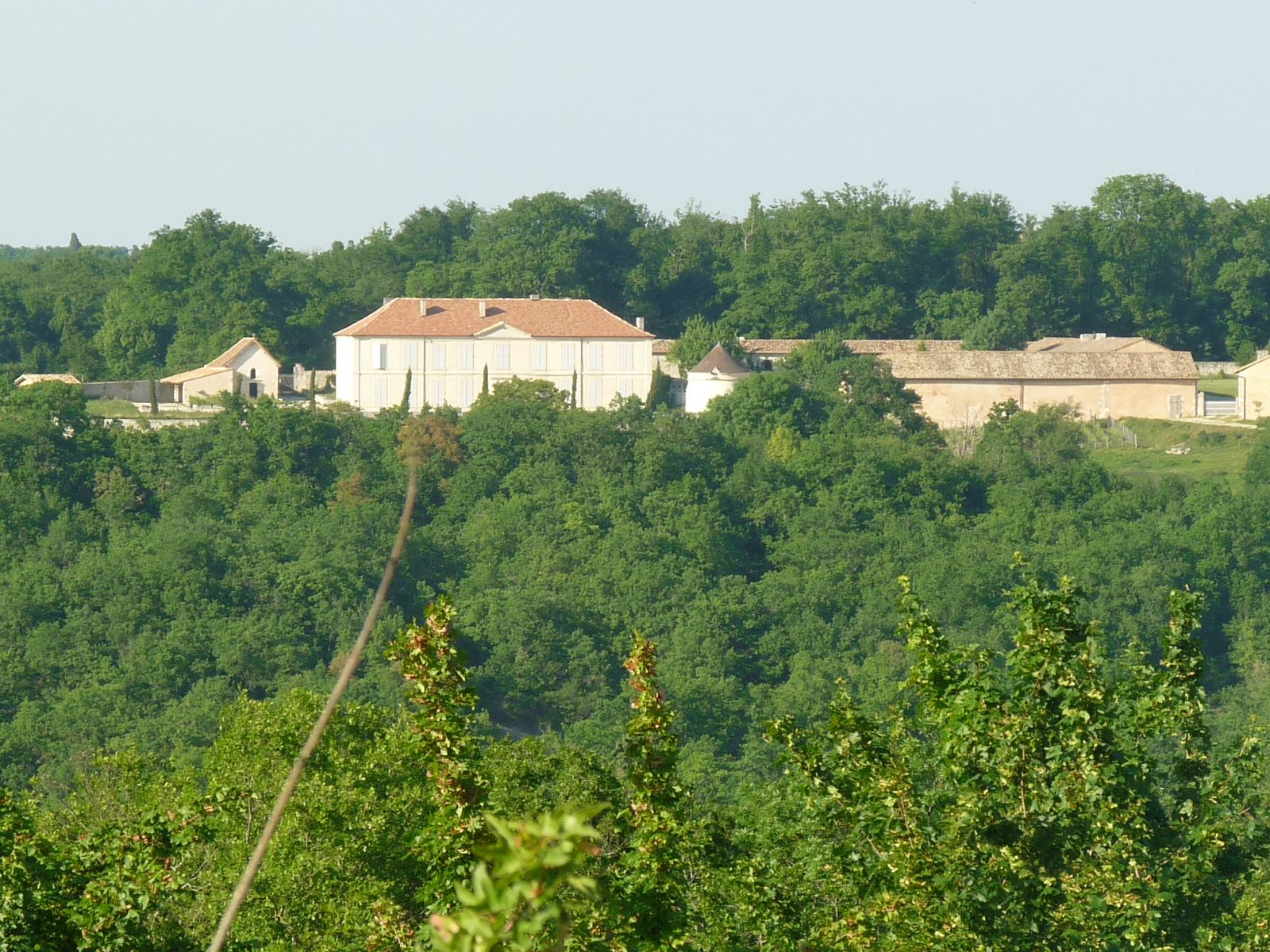 Logis de Frégeneuil (Soyaux, Charente, France) surplombant la vallée de l'Anguienne, vu depuis la route de Villebois-Lavalette à Angoulême